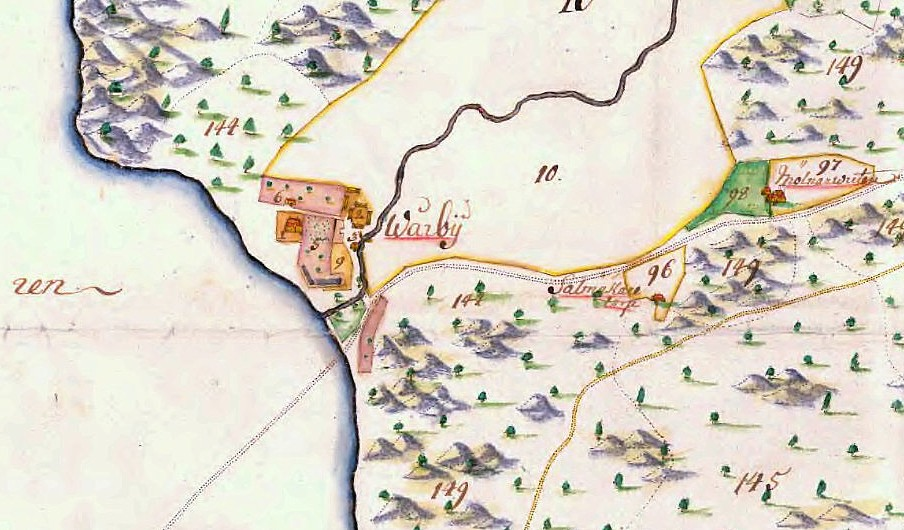 Del av "General Carta öfwer Vårby säteri 1703" med godset Vårby